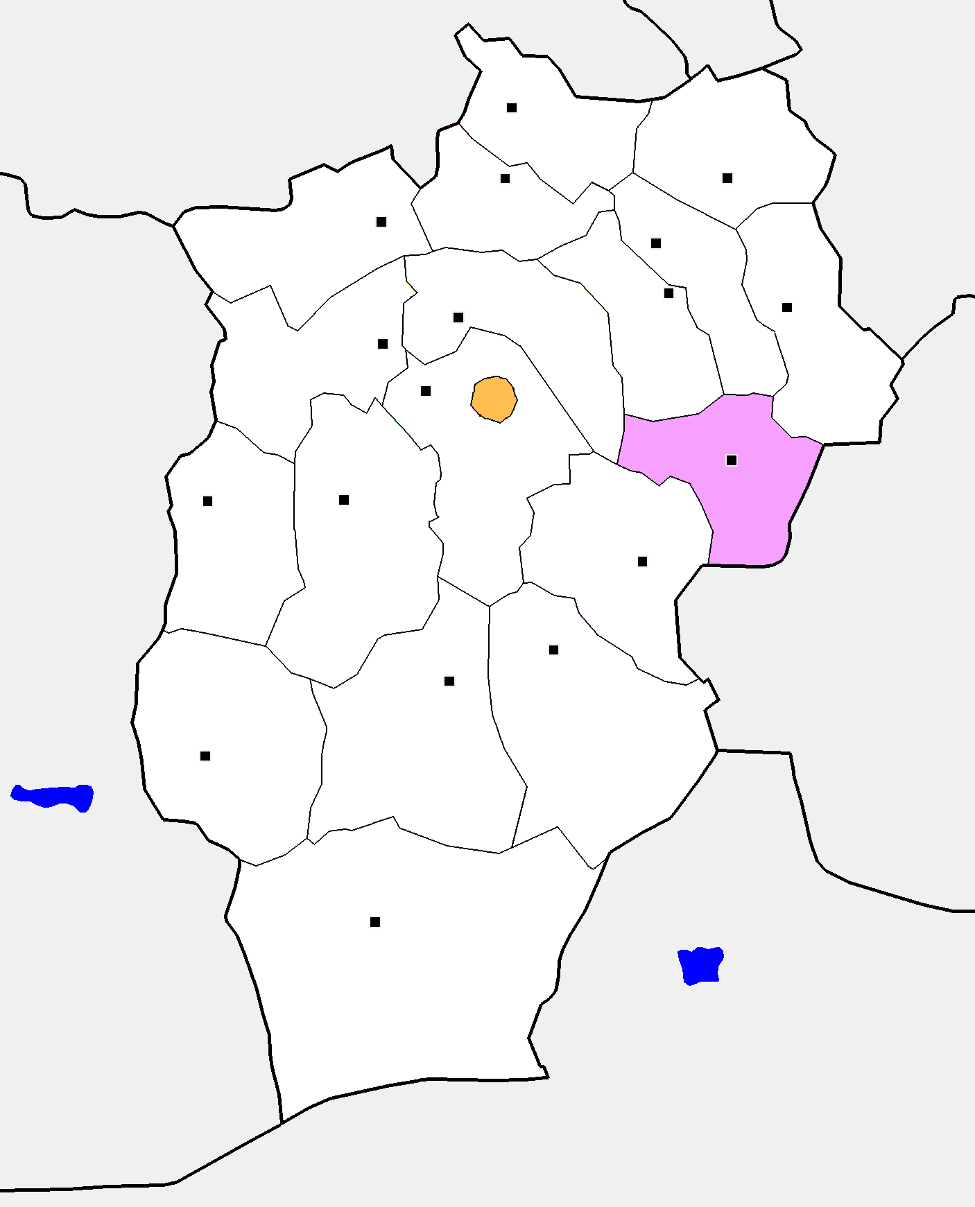 Монгол: Өвөрхангай аймгийн Сант сумын байршил